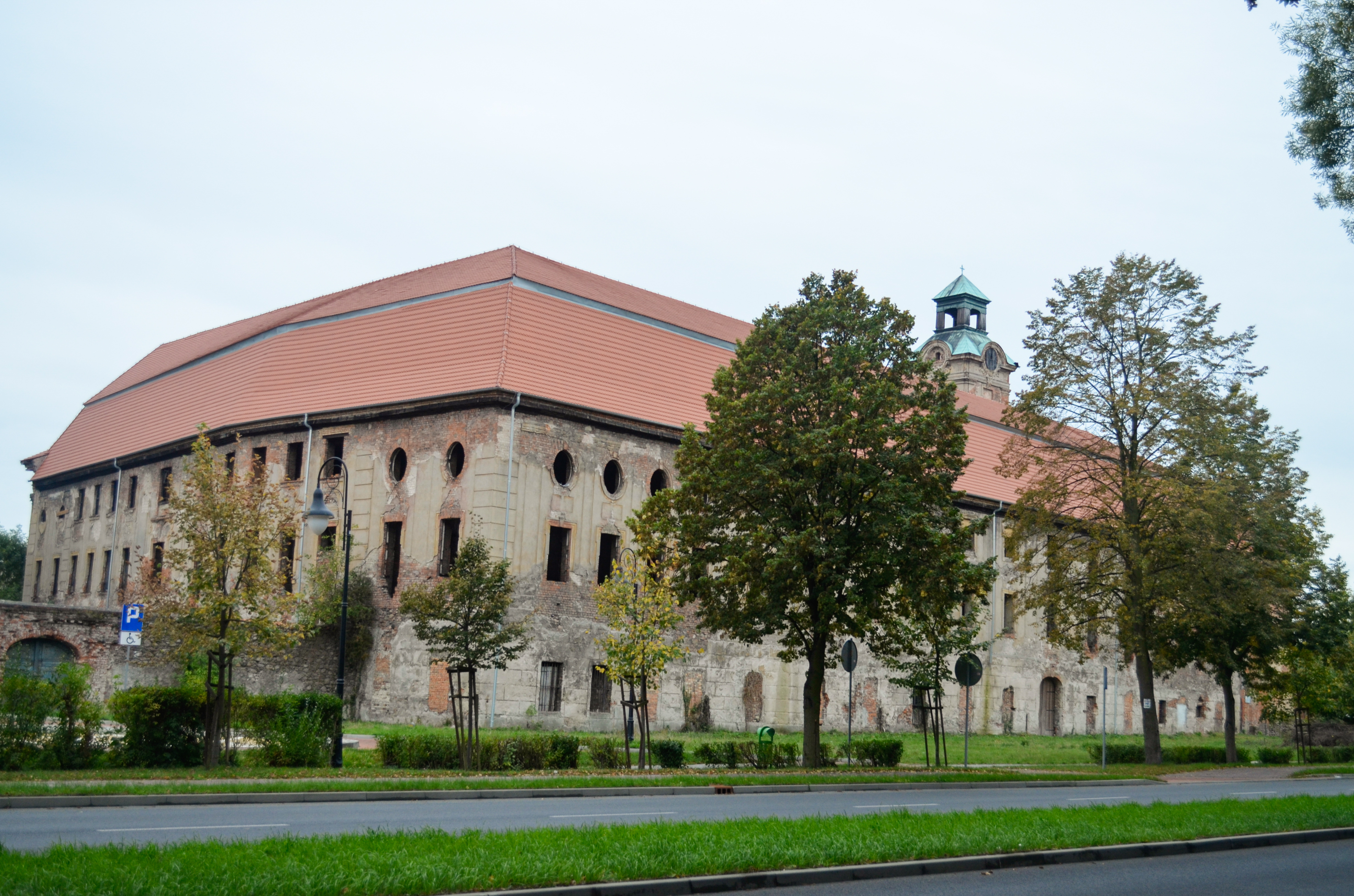 Żary, pałac Promnitzów, XIV, XVIII